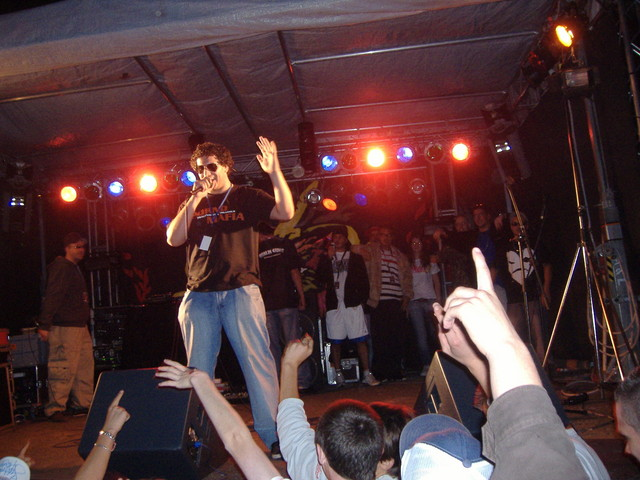 King Orgasmus One; Konzertfoto